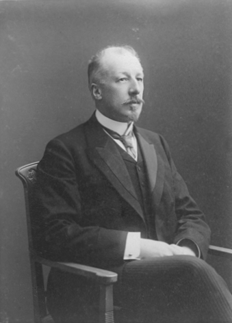 Eestimaa rüütelkonna peamees Eduard von Dellingshausen (1863-1939)